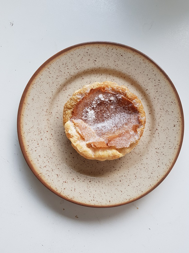 Mirliton de Rouen